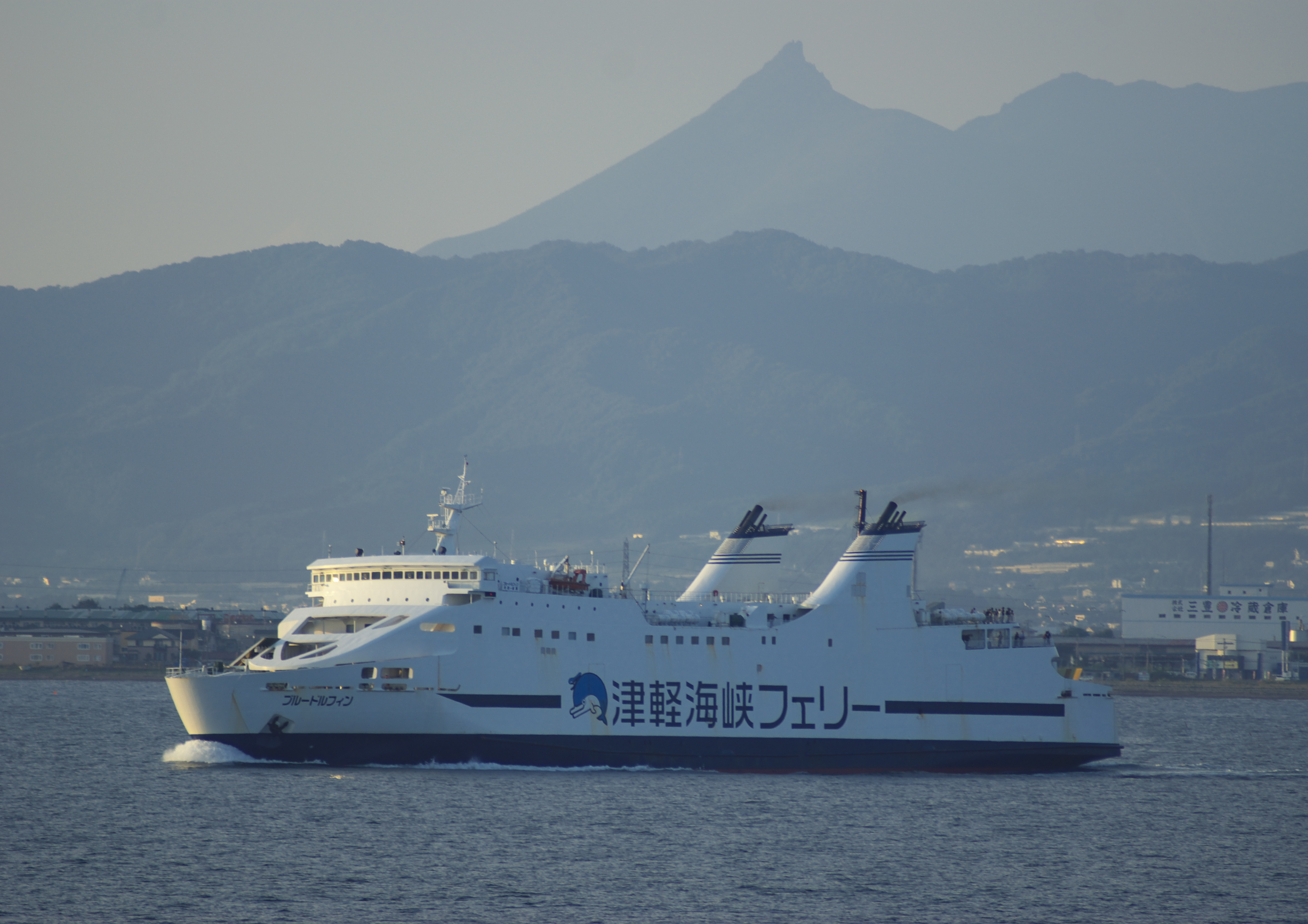 函館港内を航行する津軽海峡フェリー「ブルードルフィン」、2012年8月20日撮影。